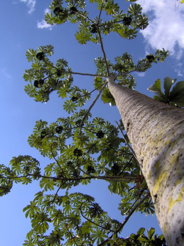 Pourouma cecropiifolia (Curumã)